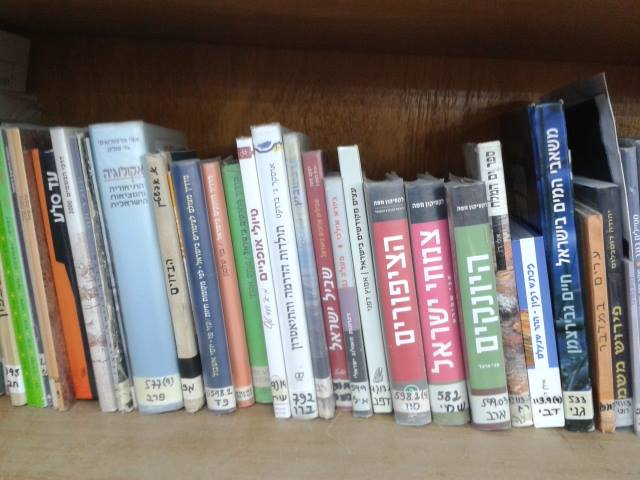 אוסף ייחודי במדעי הסביבה